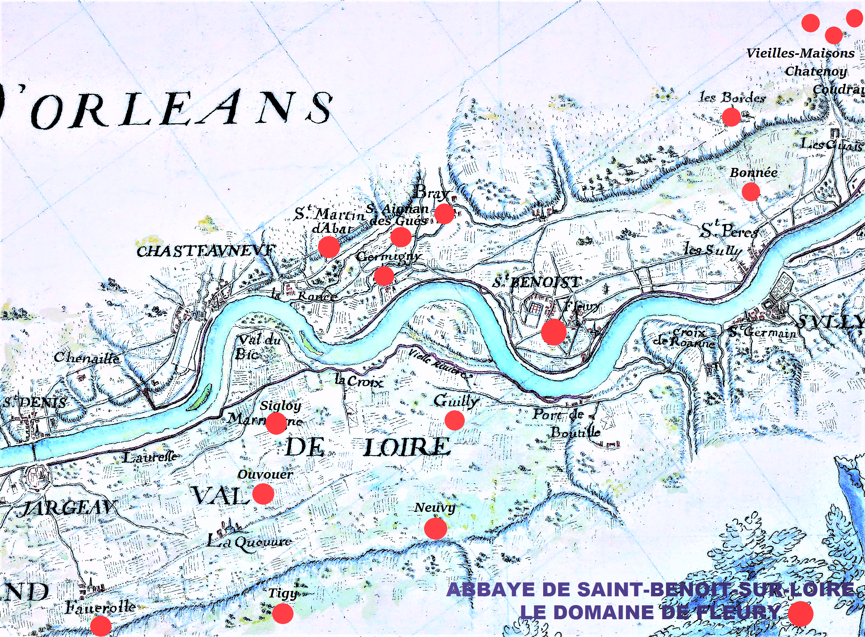 Abbaye de Saint-Benoit-sur-Loire, Domaine de Fleury (image du domaine public modifiée)